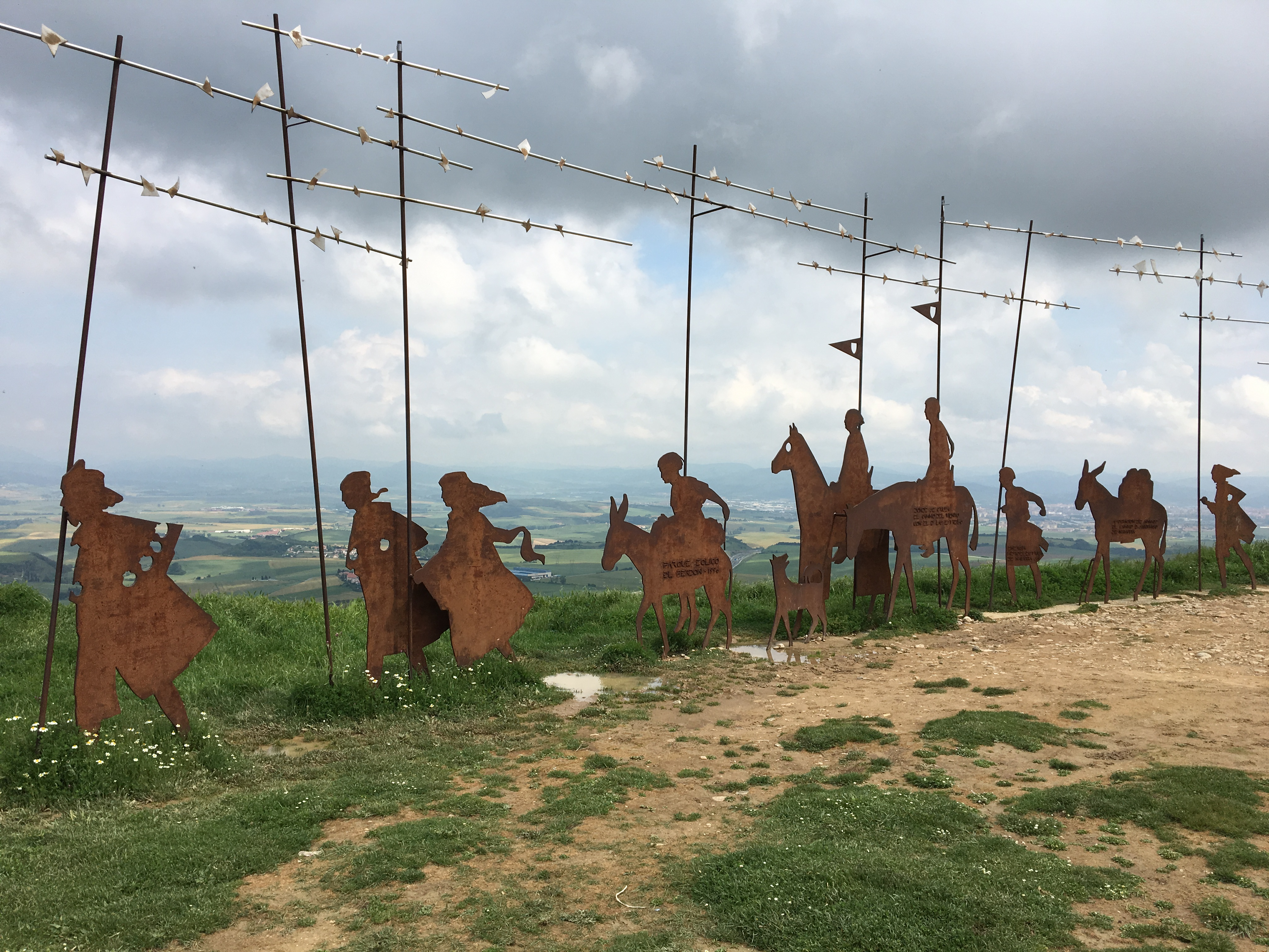 Alto del Perdón, pilgrimsmonument i smidesjärn, 10 km öster om Pamplona, Camino de Santiago, Spanien. Foto juni 2018.